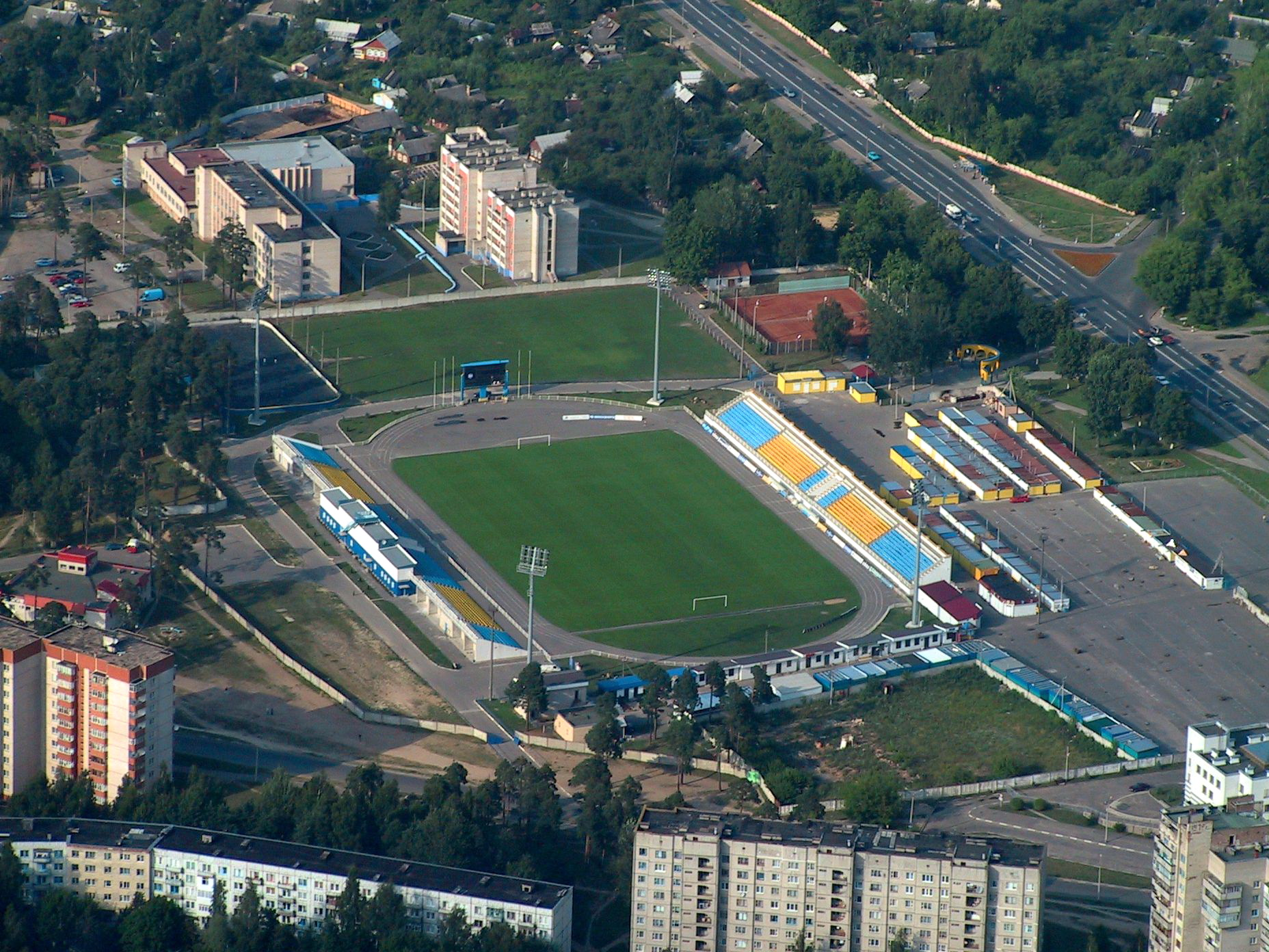 Городской стадион города Борисова, Беларусь